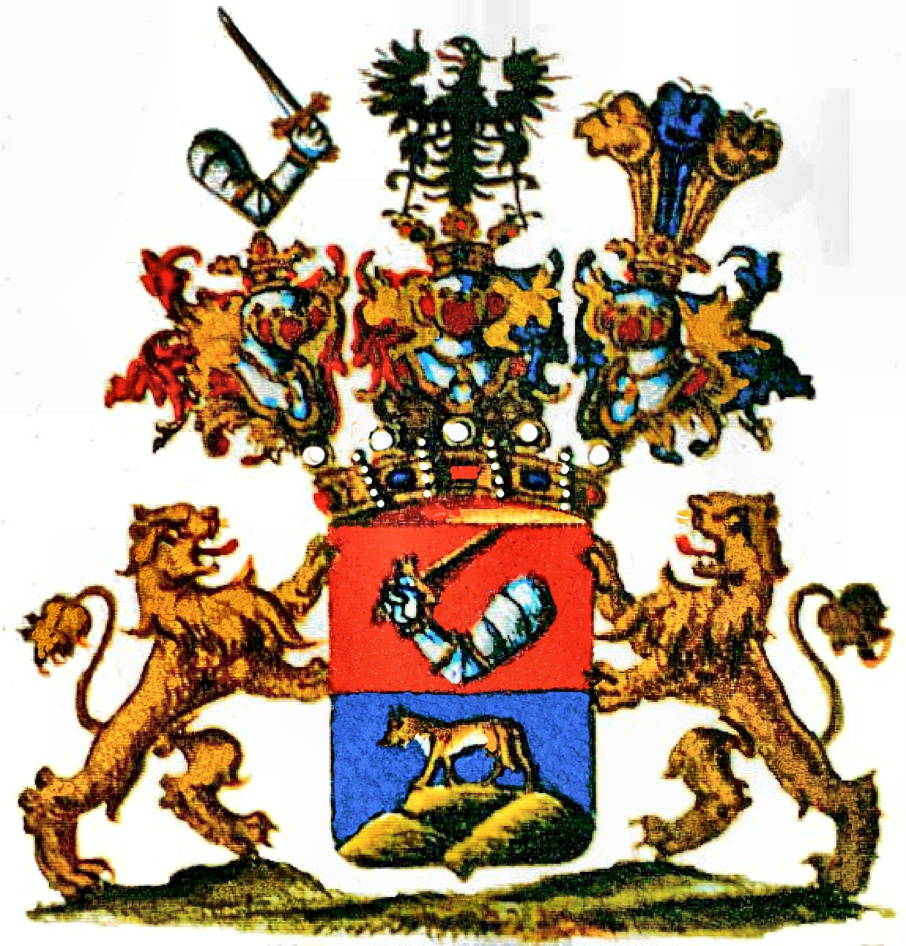 Wappen der Freiherren Lenk von Wolfsberg 1829, verliehen an Oberst Ph. Jakob Ritter Lenk von Wolfsberg und seine Nachfahren